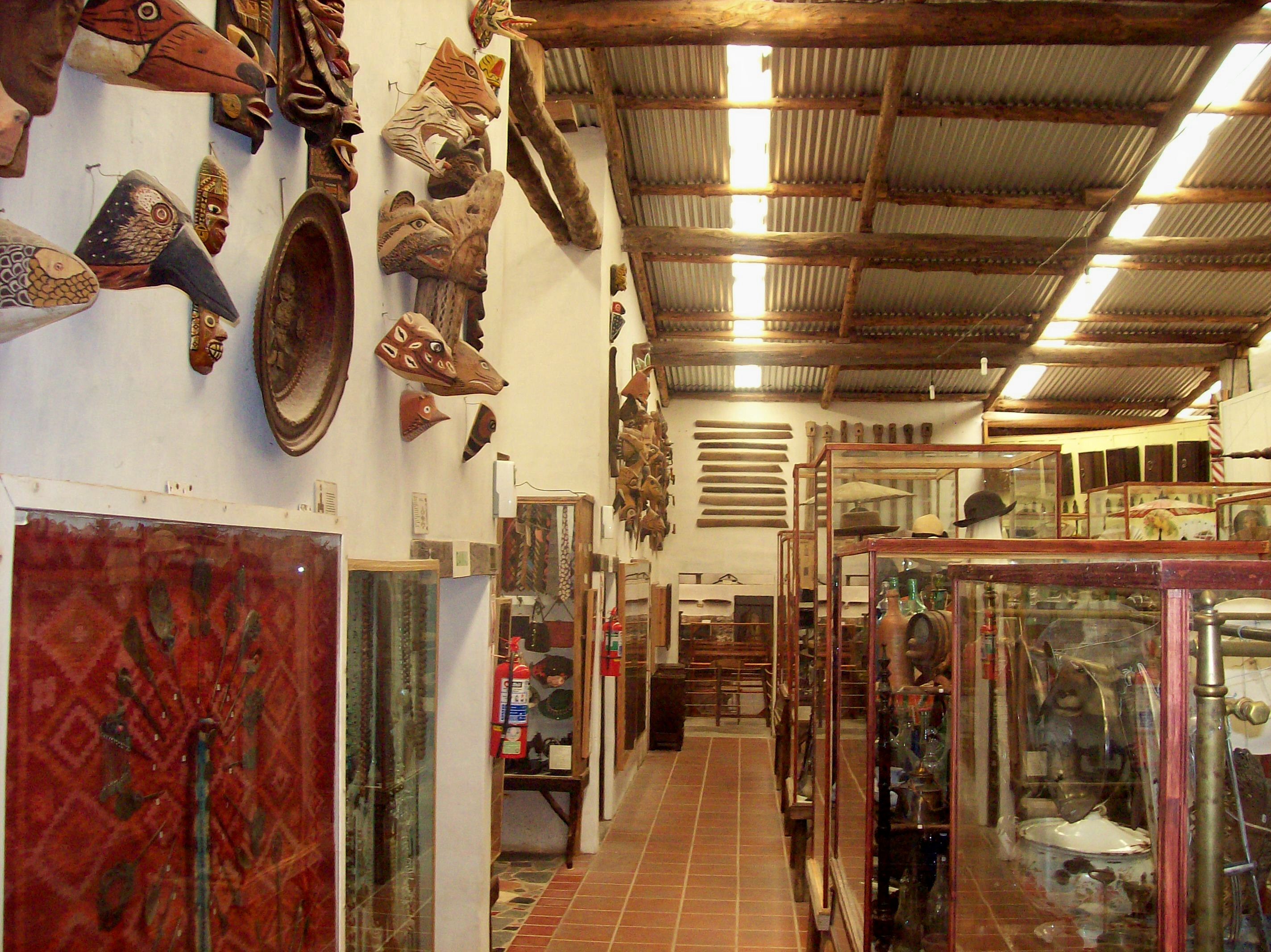 Rocsen, Museo Polifacético, en Nono, provincia de Córdoba, Argentina